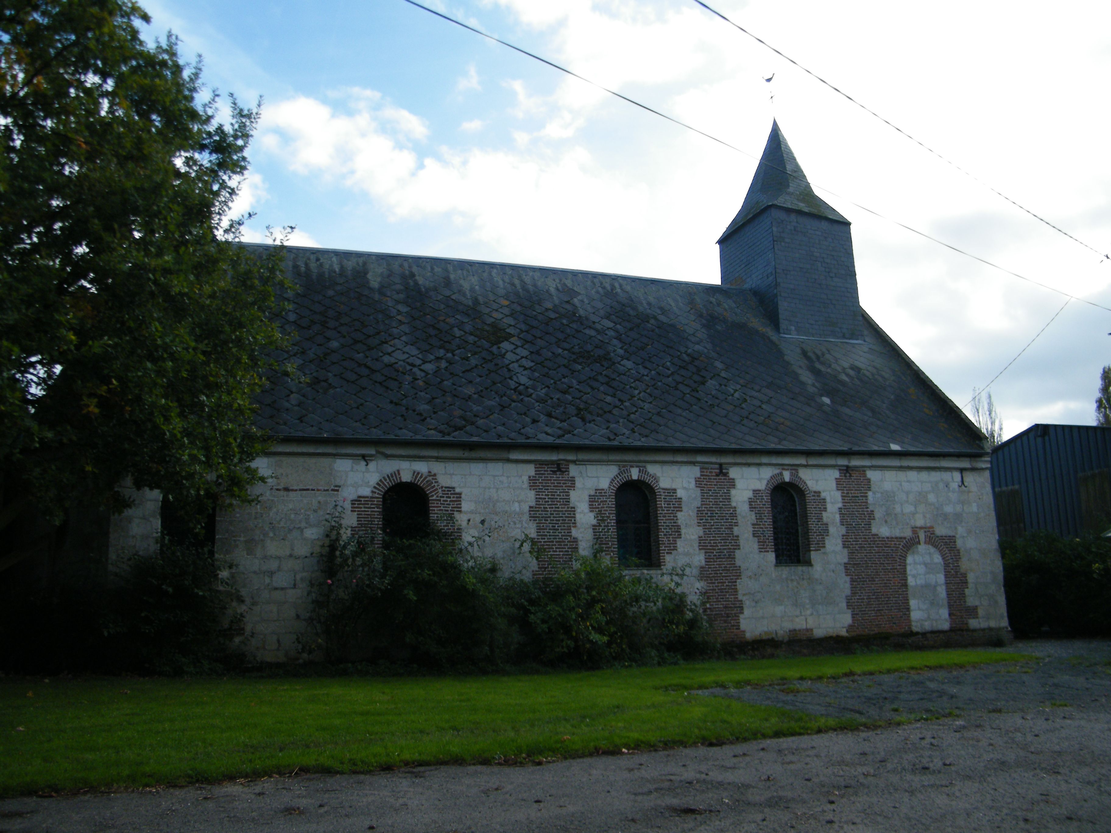 Brassy (Somme) église Saint-Hubert.